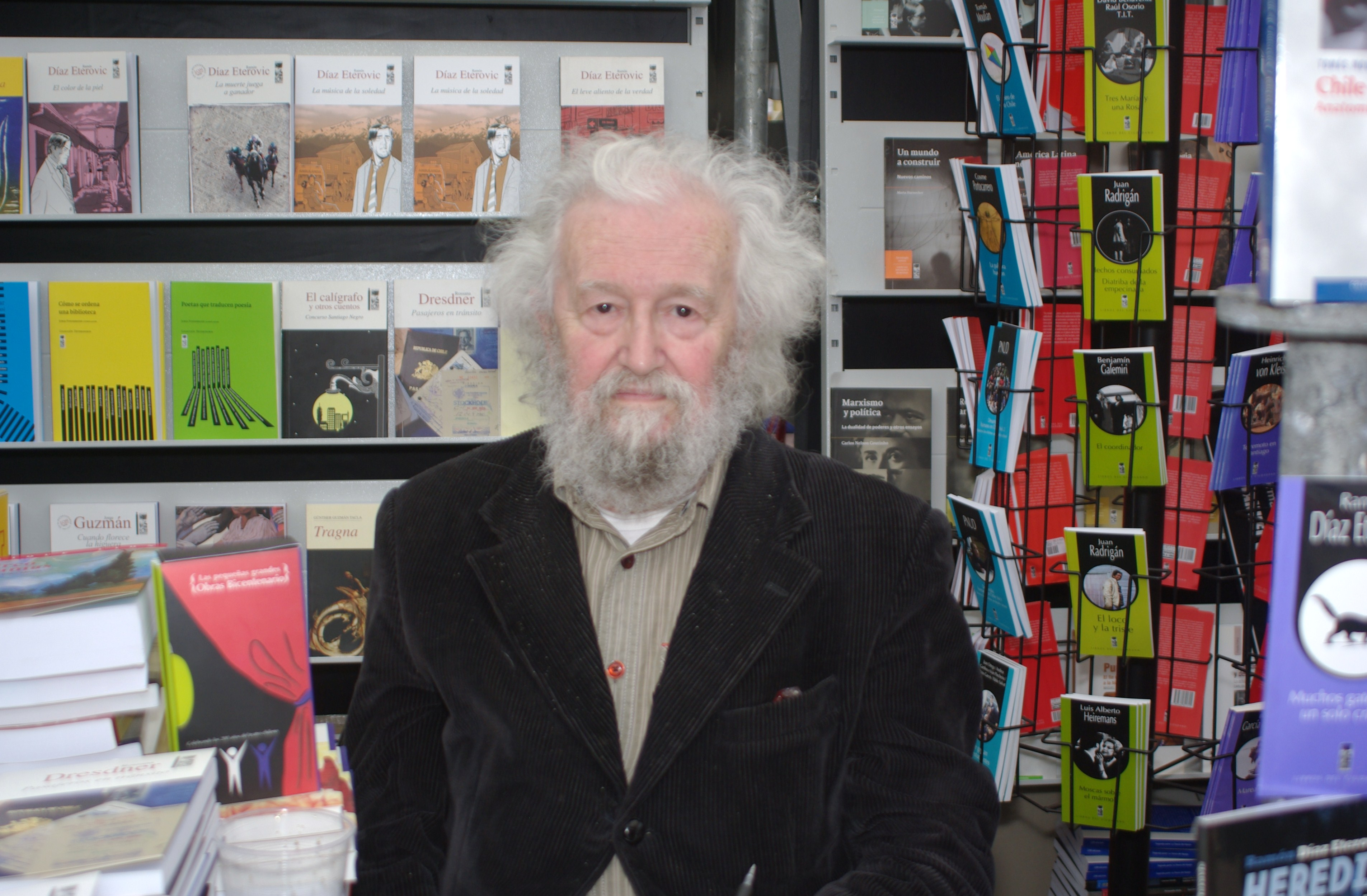 El sociólogo chileno Tomás Moulian en la Feria Internacional del Libro de Santiago 2015